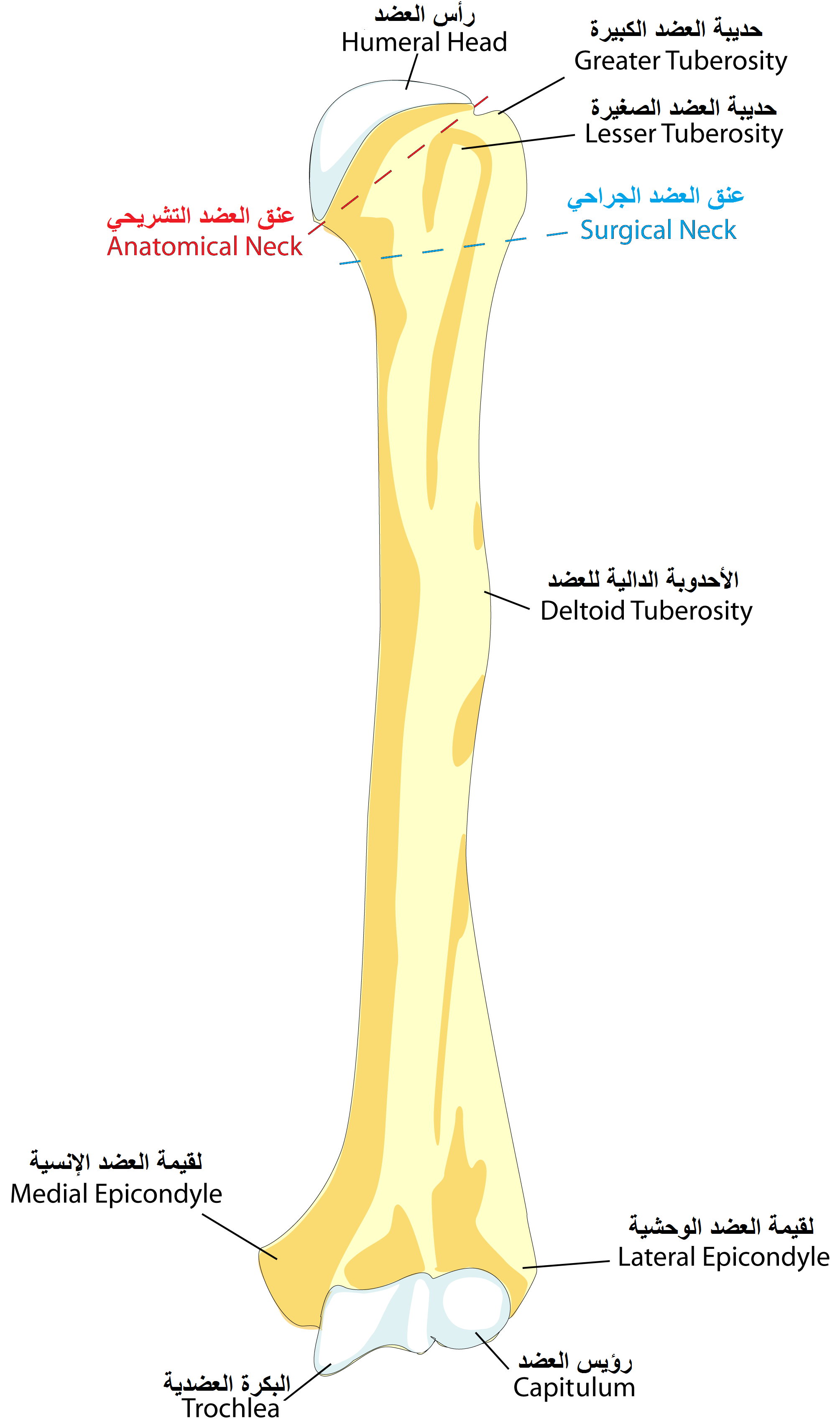 Left Humerus (Arm Bone) from the front. العضد الأيسر (عظم الذراع) من الأمام.